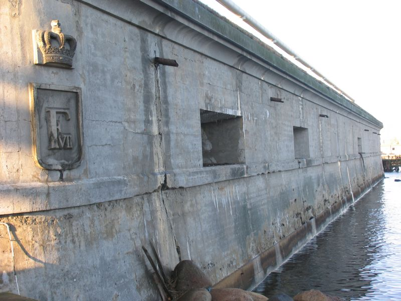 Prøvestensfortet (Prøvestenen), forsiden mod Øresund Sooe 7. jan 2010, 12:27 (CET)